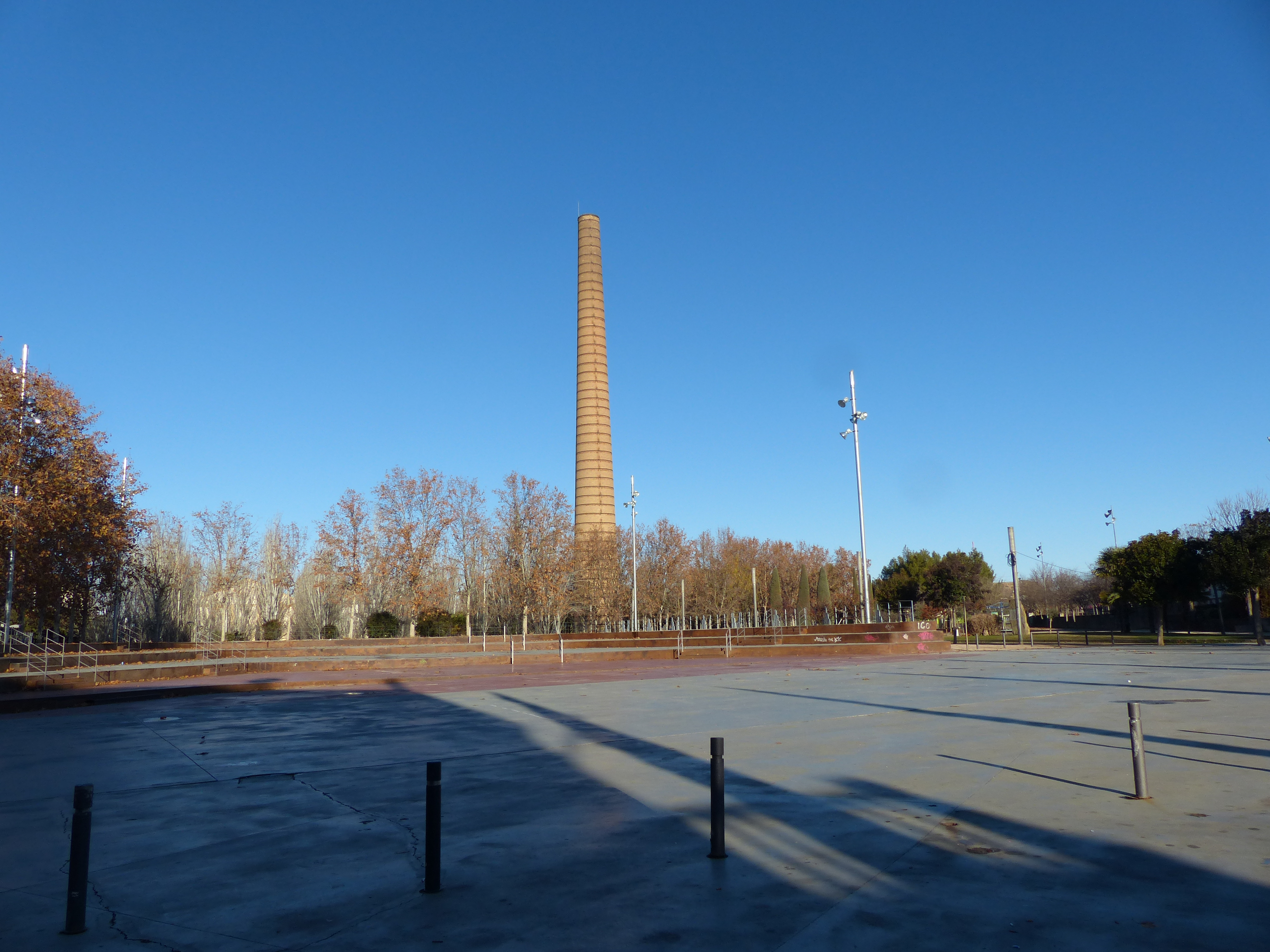 Chimenea de la azucarera de Monzón, provincia de Huesca, España.